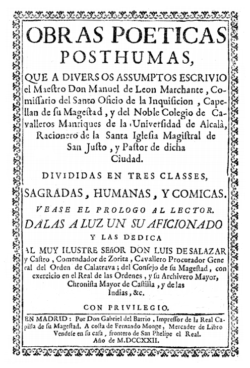 Portada del libro Obras poéticas posthumas (tomo I) de Manuel de León Marchante. Recopilación de Fernando Monge publicada en Madrid, edición de 1722.